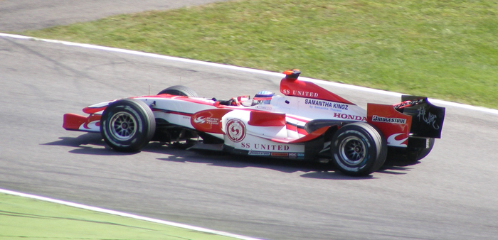 Takuma Sato at the 2007 Italian GP